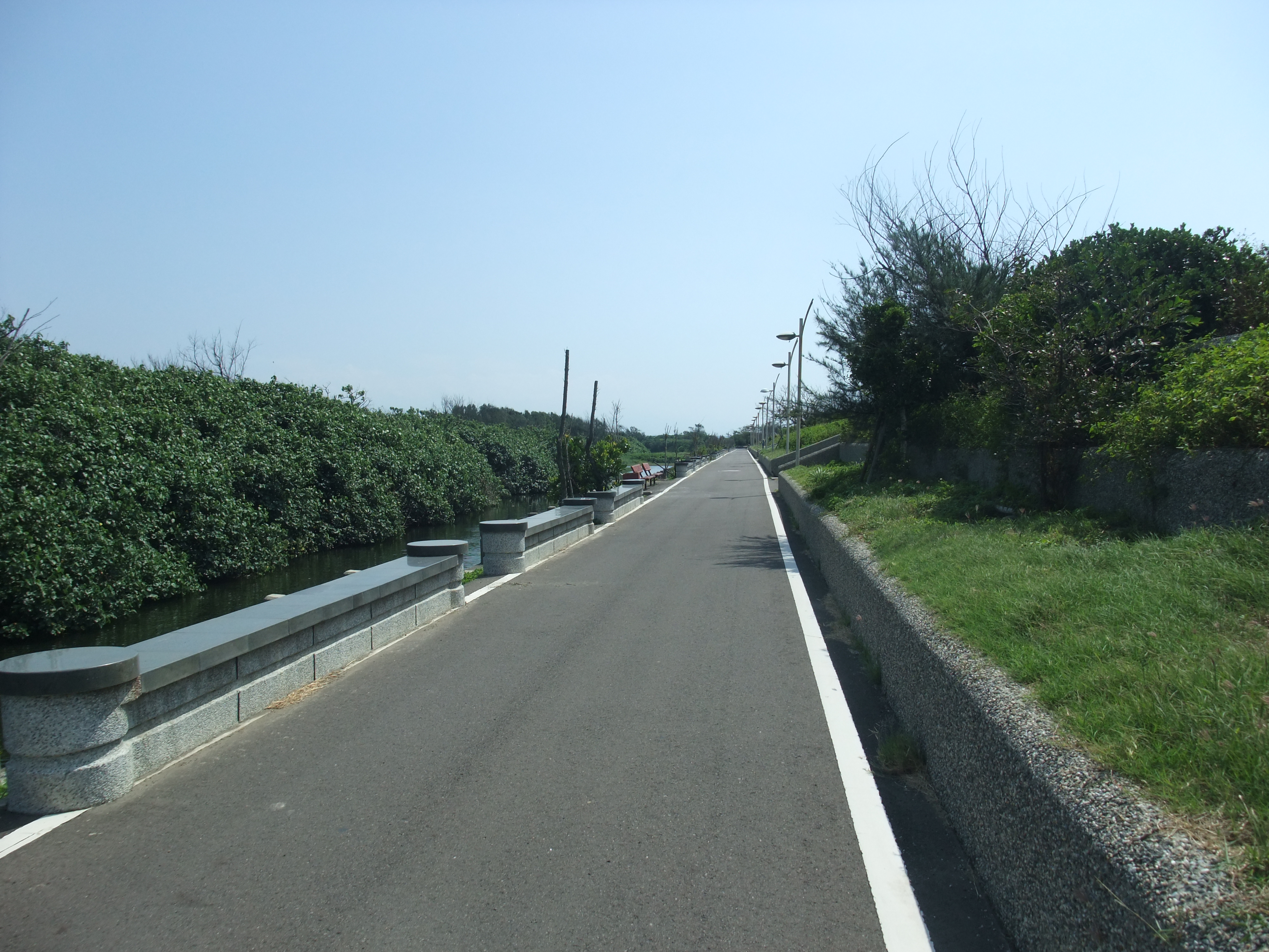 中文（台灣）: 港南運河車道